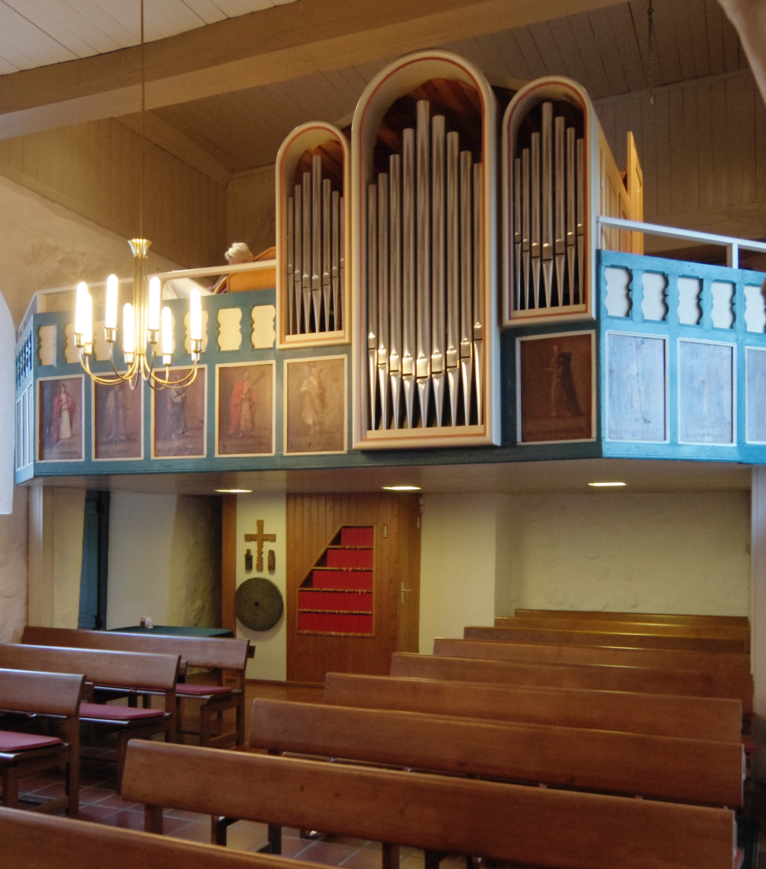 St. Annen zu Taarstedt, Kreis Schleswig-Flensburg. Orgelempore mit Apostelbildern aus dem 18. Jh.